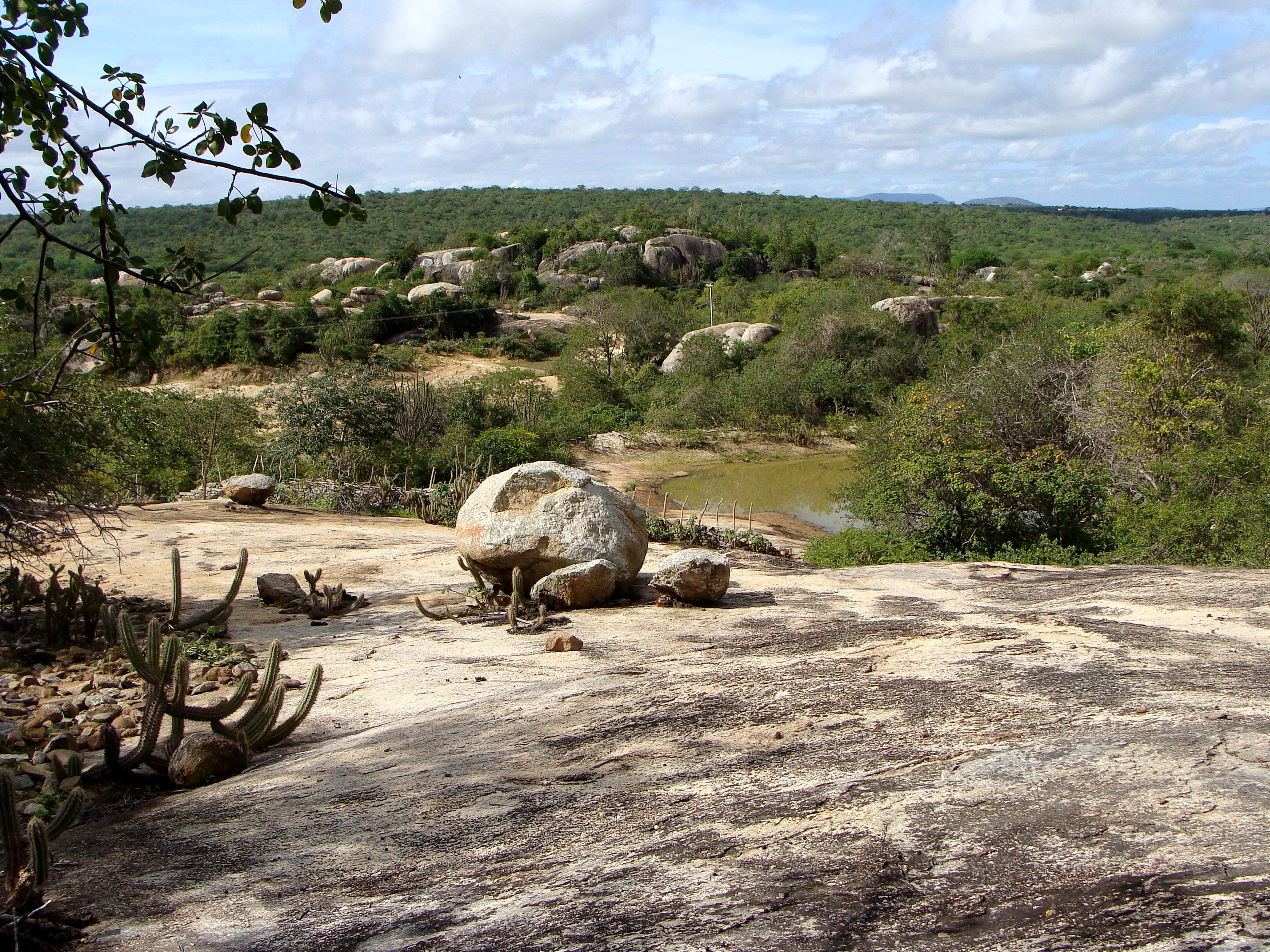 Registro fotográfico da Caatinga Paraibana durante o período chuvoso, município de Boa Vista.